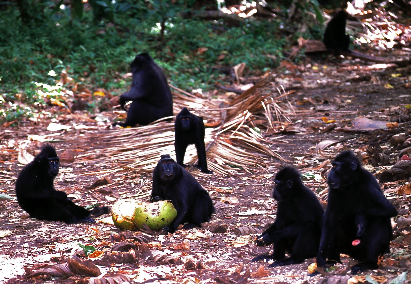 Tangkoko NP, Sulawesi INDONESIA